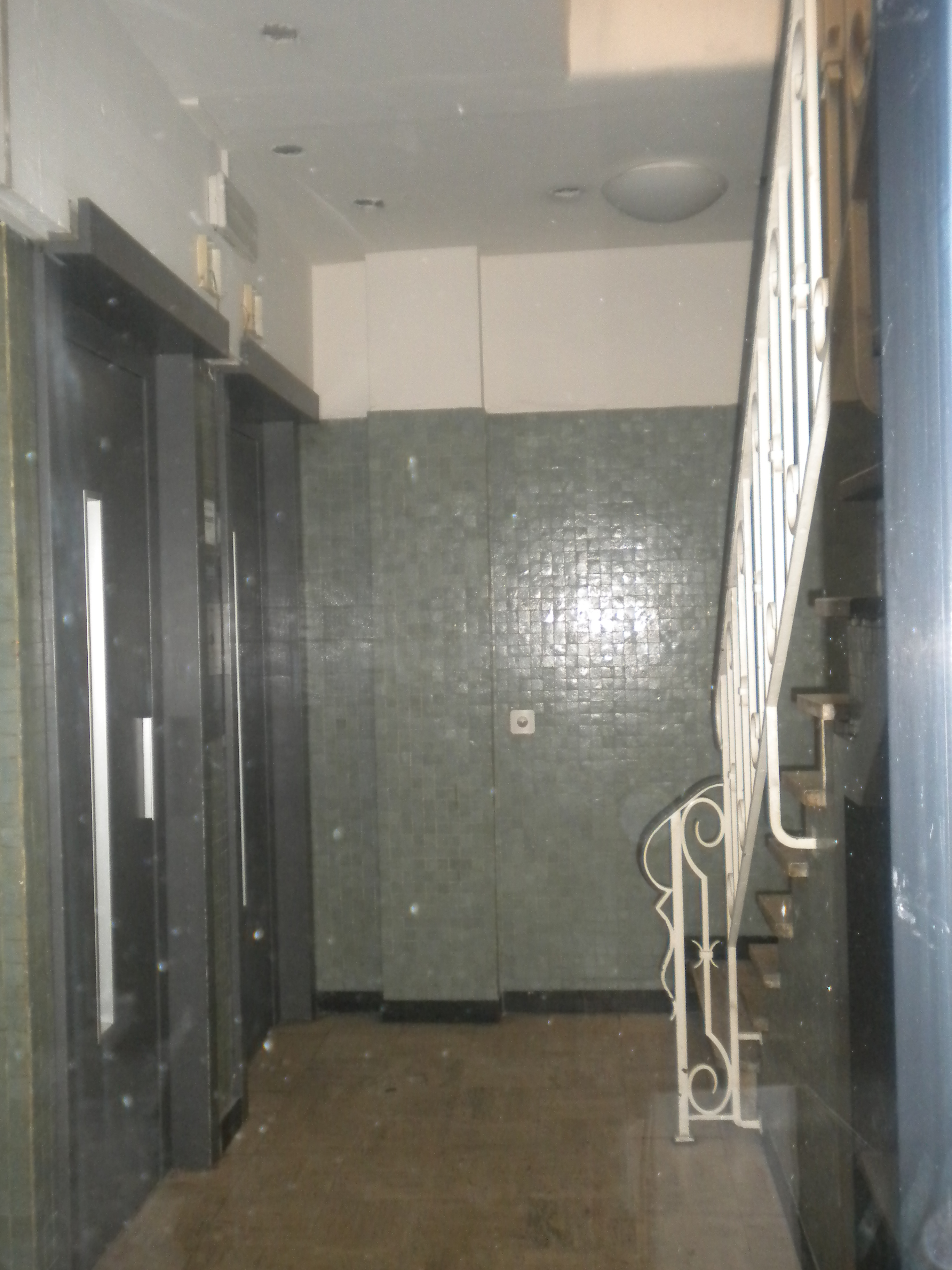 Entrée des premiers locaux des éditions Dupuis et Spirou dans la galerie du Centre à Bruxelles.